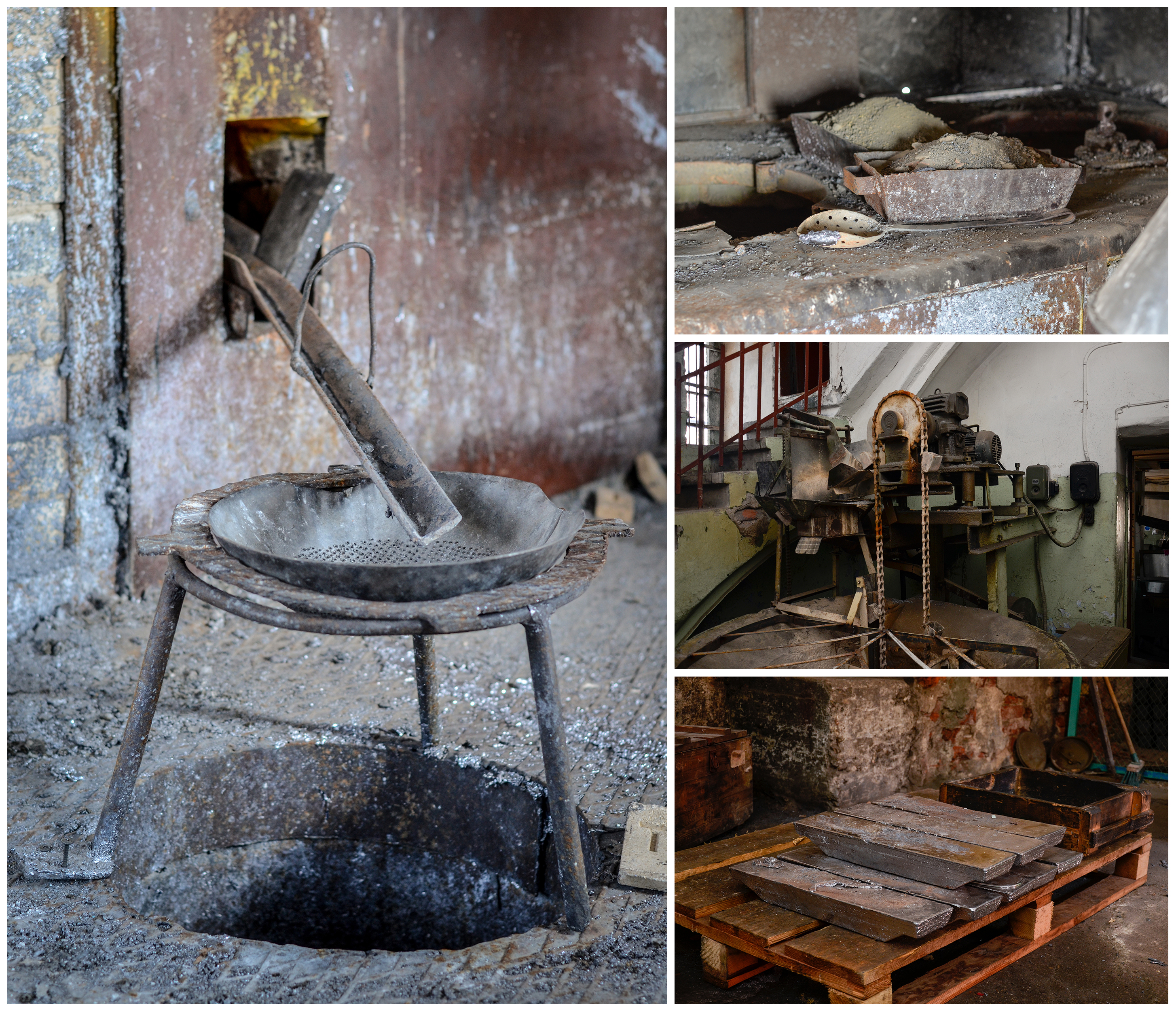 Daugavpils skrošu rūpnīcas skrošu liešanas tornis un padziļinājuma aka, Daugavpils, Varšavas iela 28